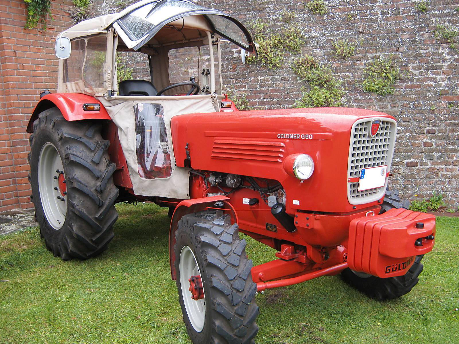 G60 mit Allradantrieb, Verdeck und Frontgewichten